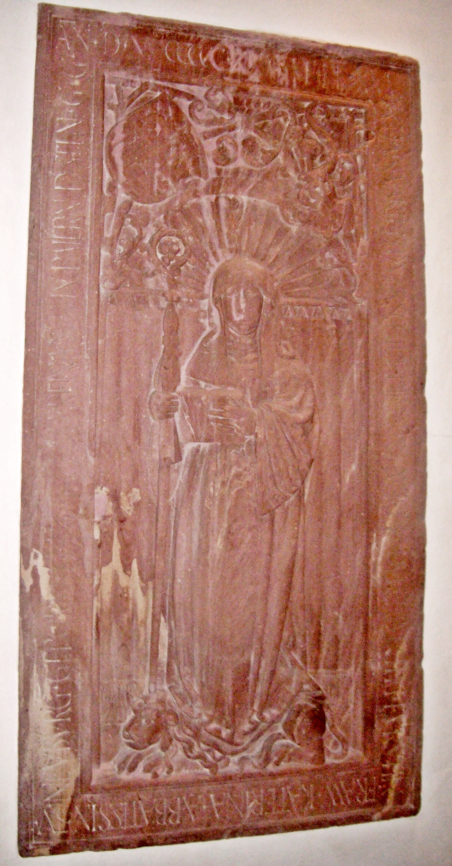 Prinzessin Katharina von der Pfalz (1499-1526), Äbtissin des Klosters Neuburg bei Heidelberg, Grabplatte in der dortigen Klosterkirche.